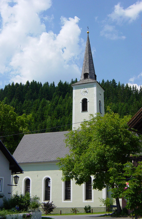 Filialkirche Hl. Nikolaus in Dellach im Gailtal